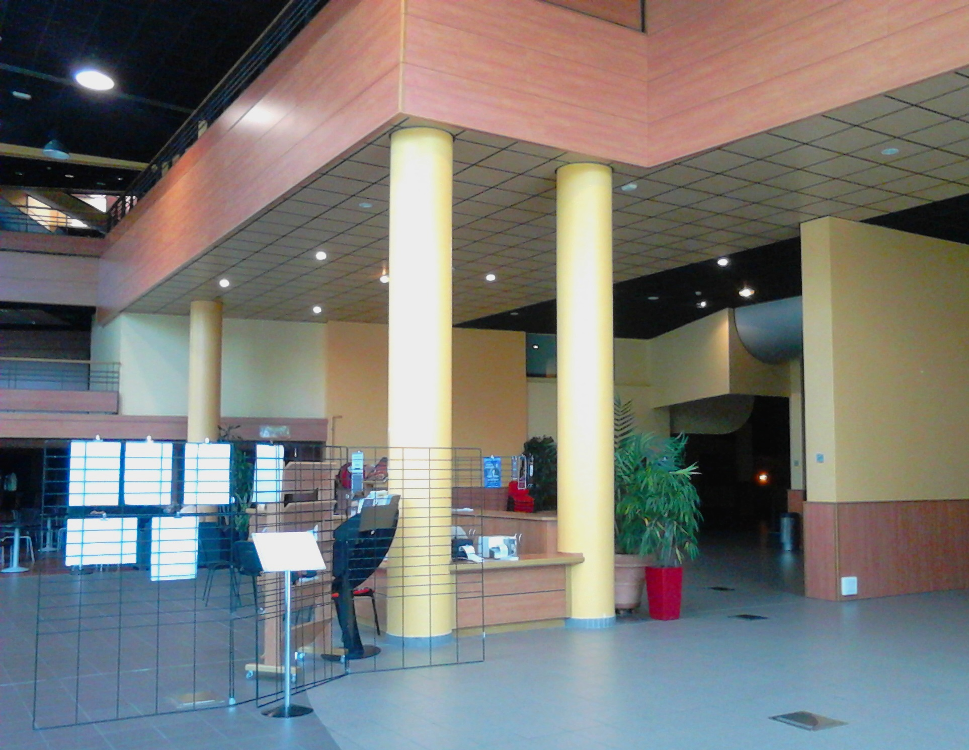 Hall d'entrée avec la billetterie du Centre culturel et des congrès André Grosjean à Aix-les-Bains.